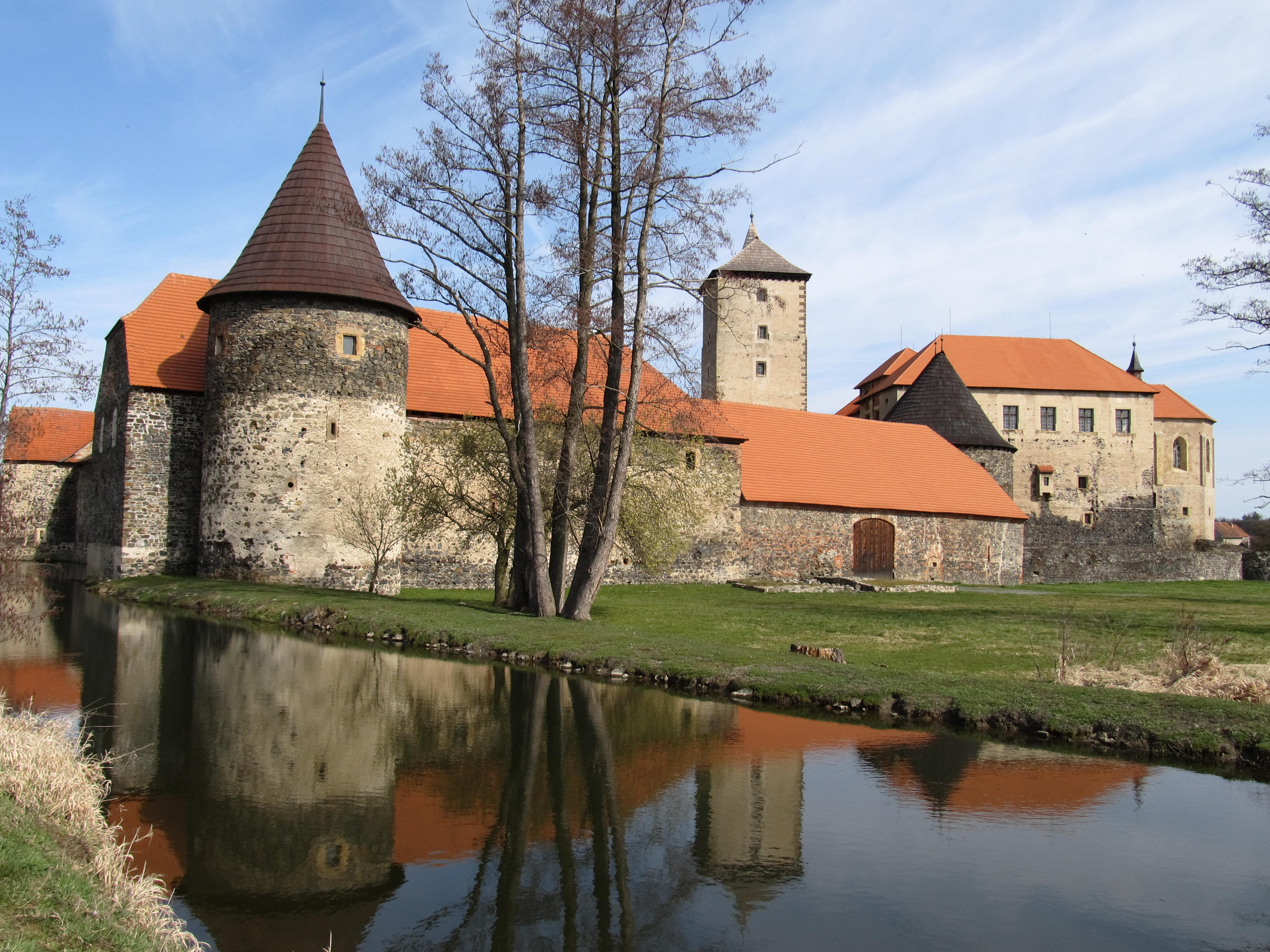 Hrad Švihov